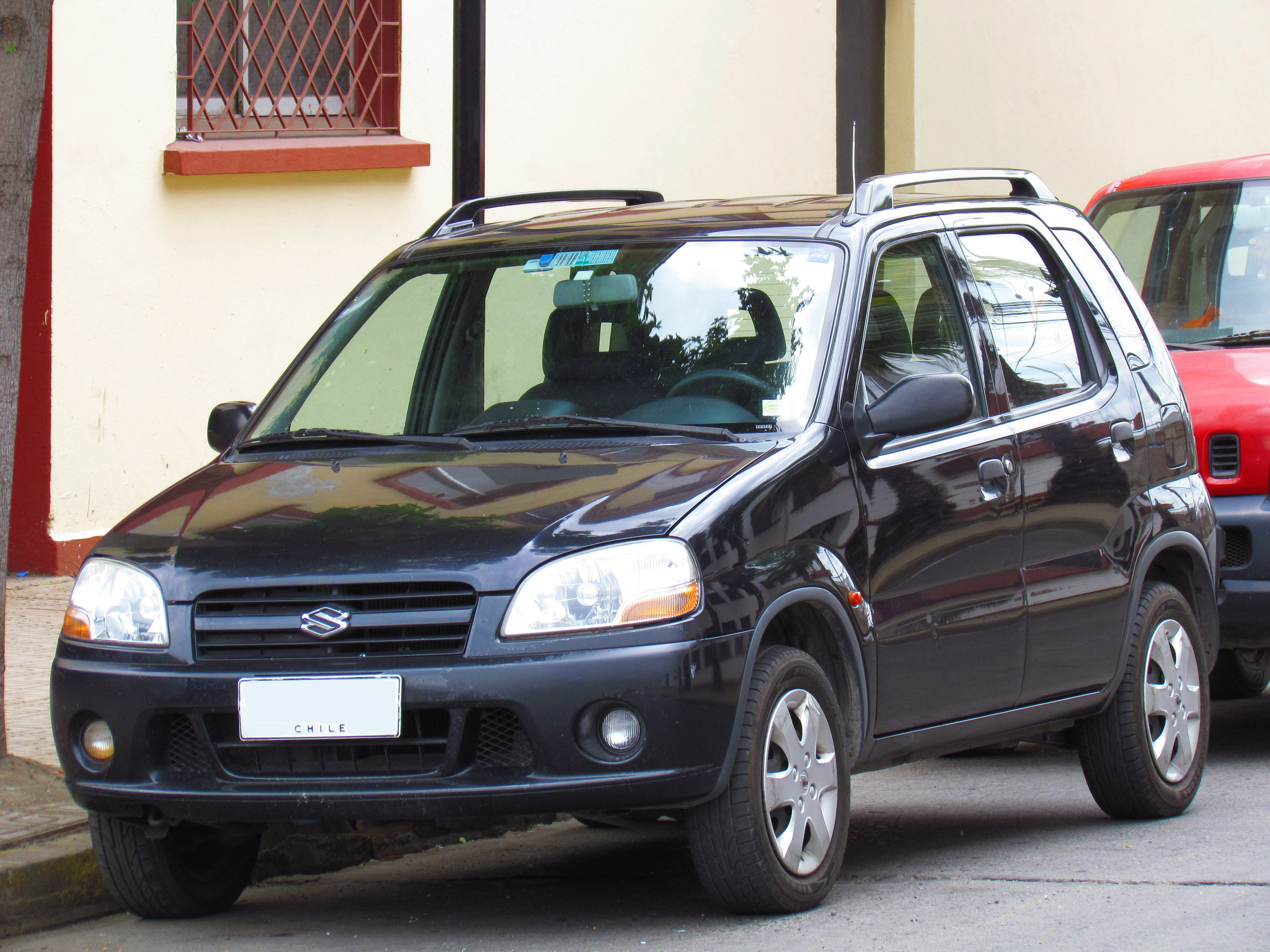 Suzuki Ignis 1.3 GL 4x4 2005